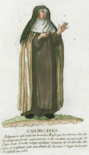 Collection de costumes de tous les ordres monastiques, supprimés à differentes époques, dans la ci-devant Belgique, Bruxelles, Philippe Joseph Maillart et sœur, 1811